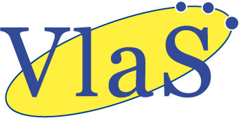 VlaS